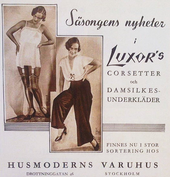 Husmoderns varuhus annons